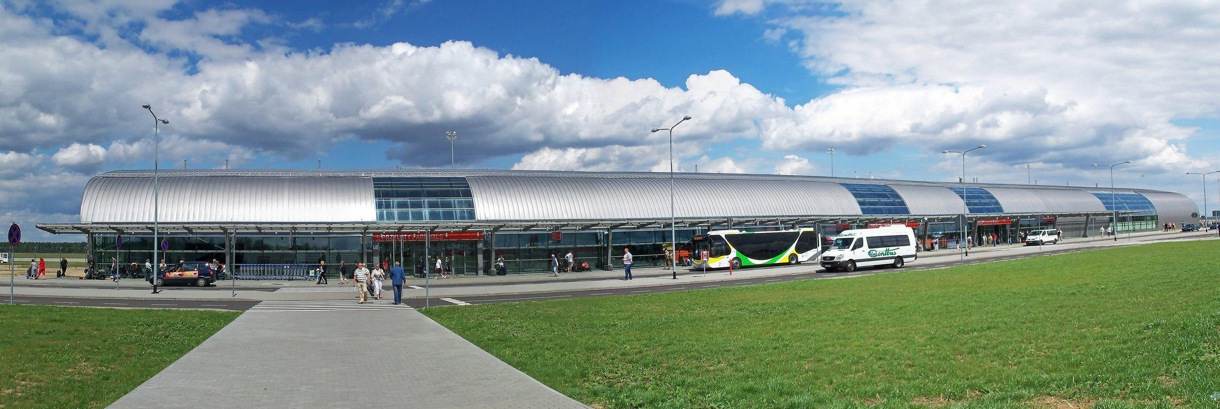 Terminal lotniska Modlin widziany od południa, pod terminalem stoi na przystanku autobus Kolei Mazowieckich przewożący pasażerów z przystanku kolejowego Modlin pod terminal i odwrotnie